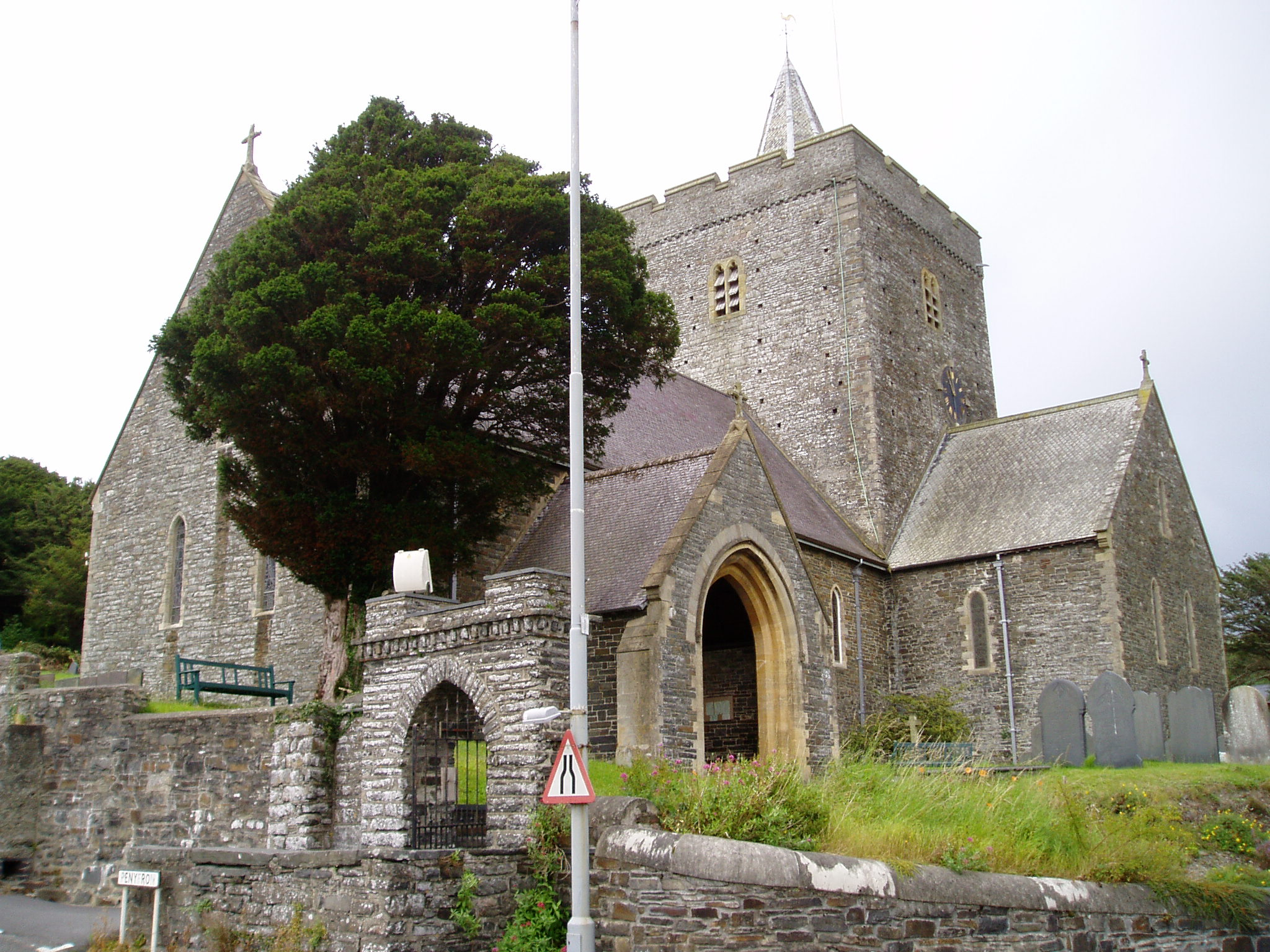 Saint Padarn's Church in Llanbadarn Fawr.